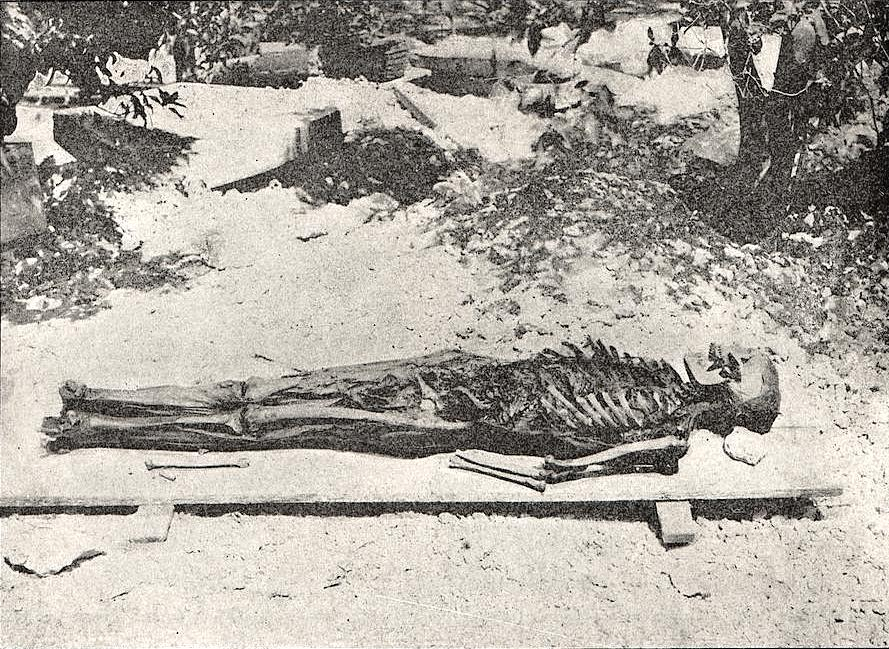 Squelette du roi Tabuit.